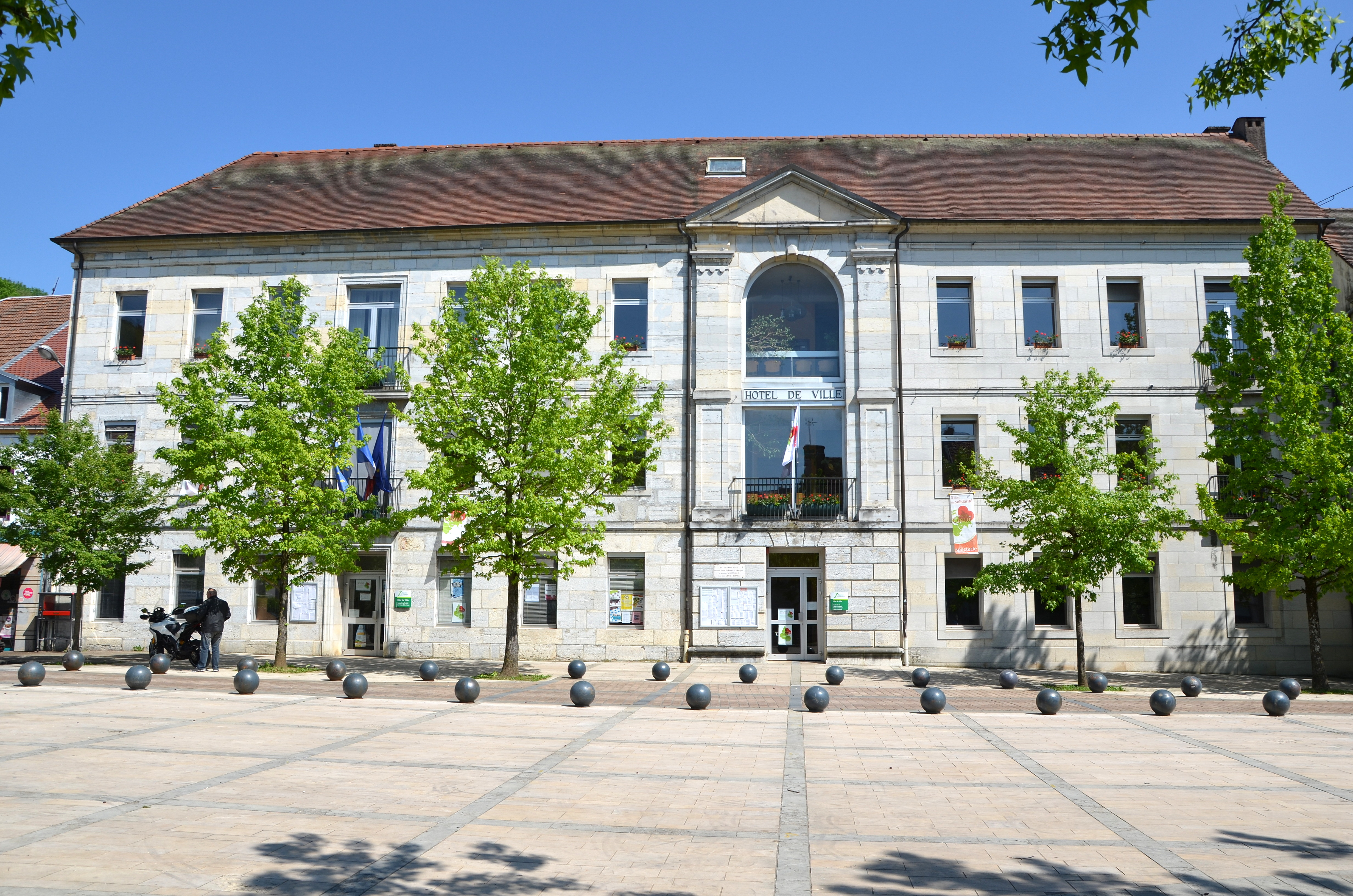 Mairie de Baume-les-Dames, Doubs, Franche-Comté, France